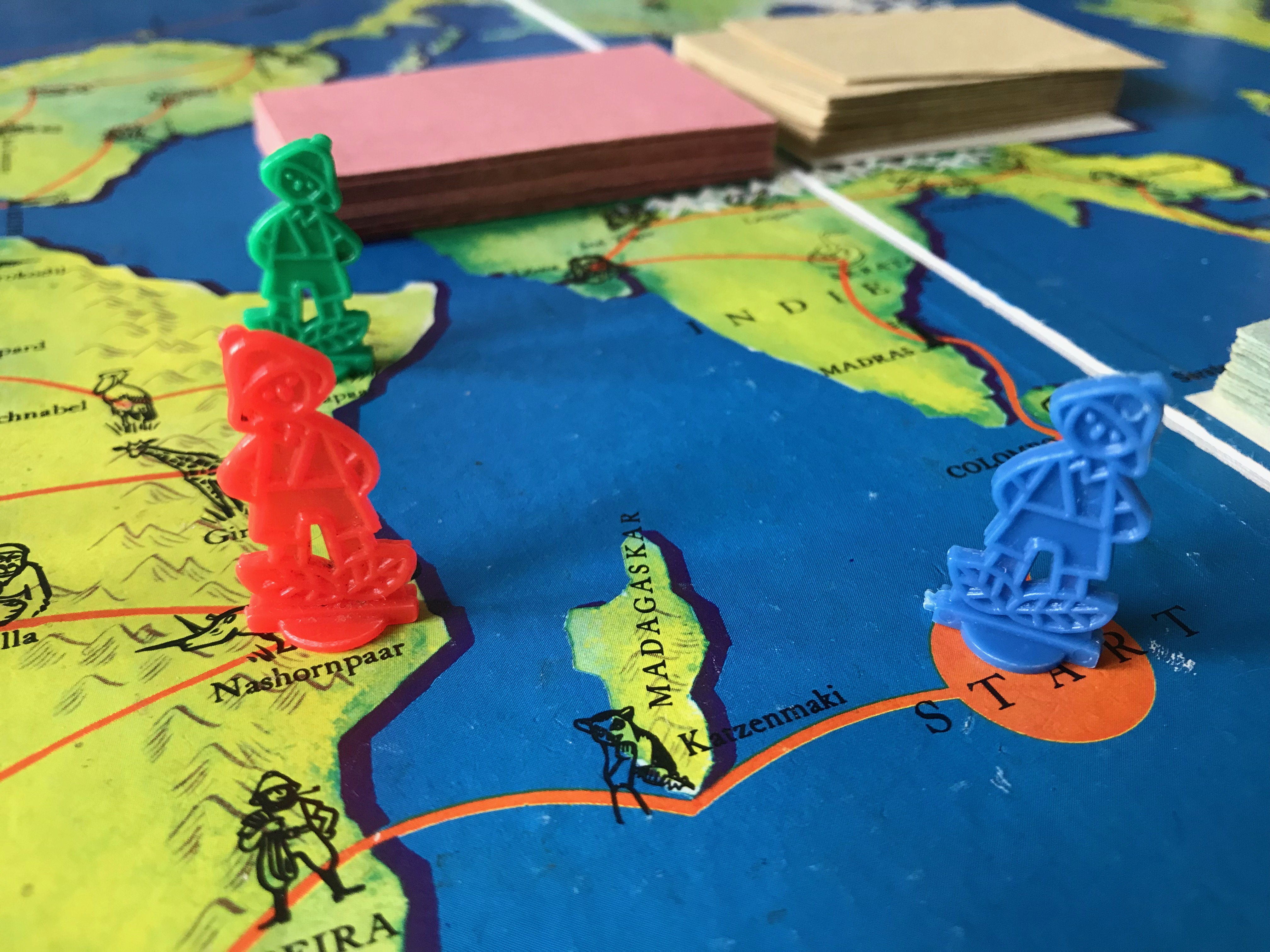 Spielmaterial des Spiels Wild Life, Ravensburger um 1965